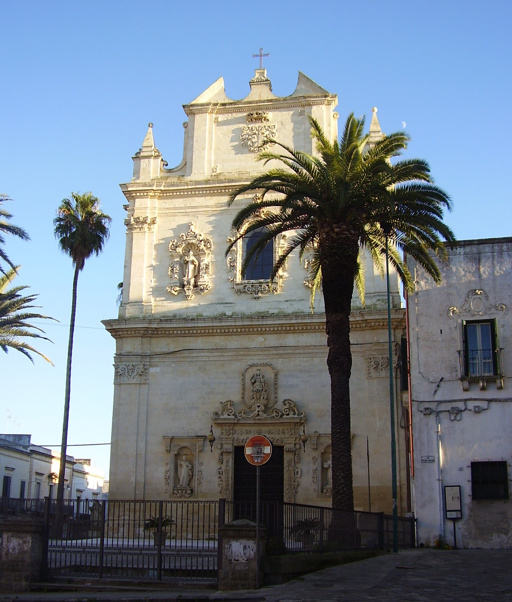 Chiesa del Carmine Galatina, Lecce